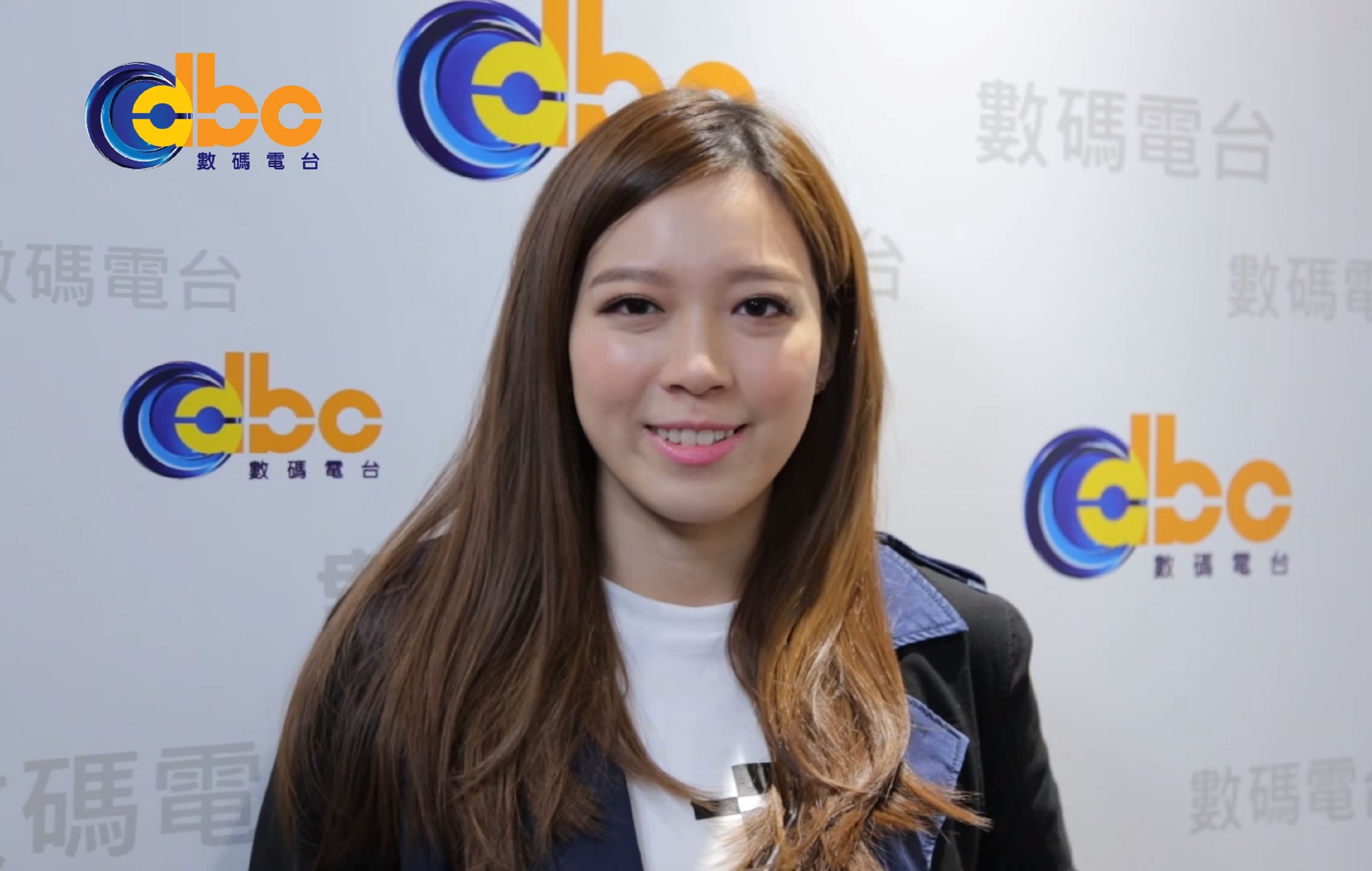 中文（香港）: 無綫五虎將黃日華的女兒